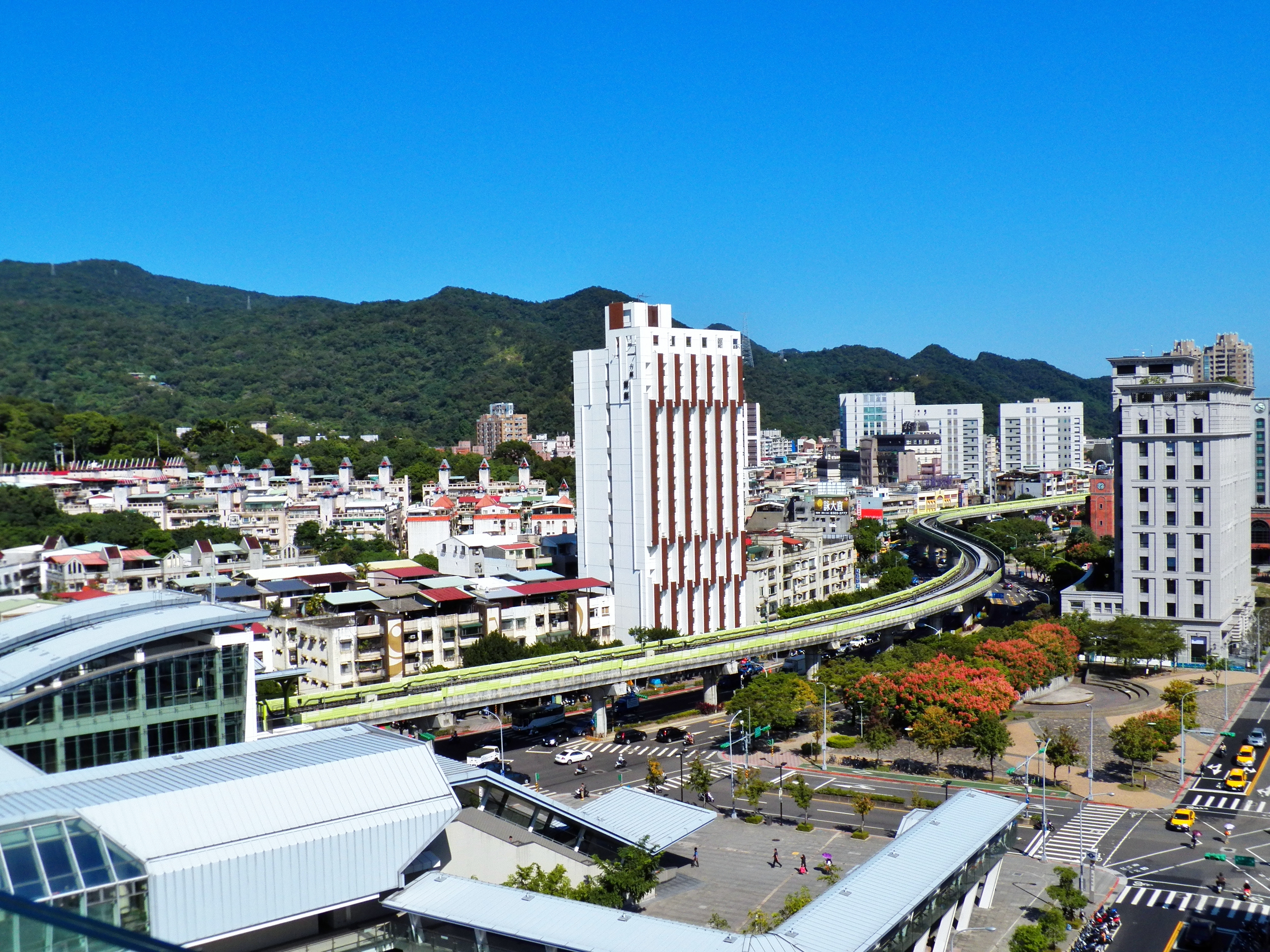 由典華飯店旗艦館屋頂東望臺北捷運內湖線。